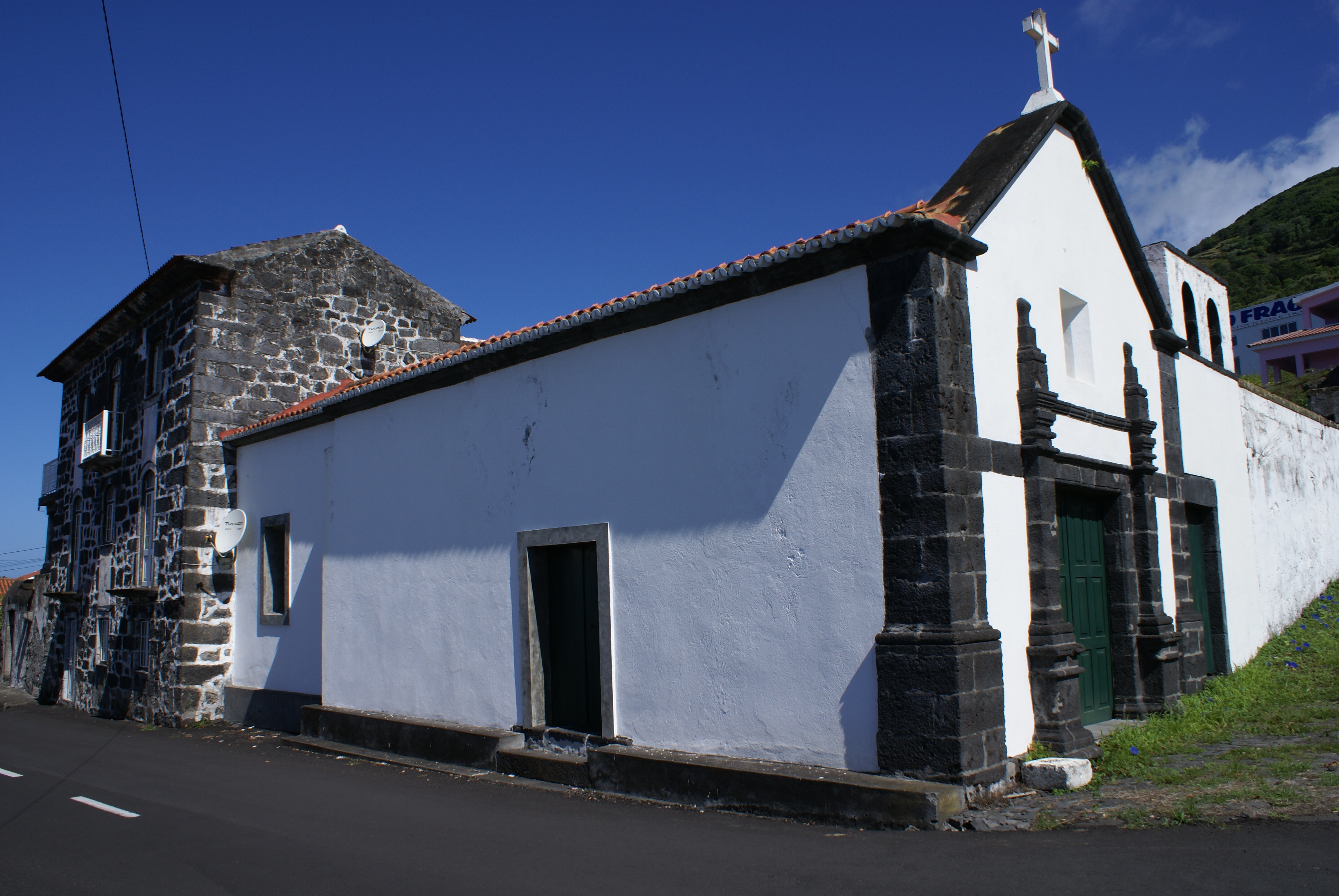 Capela de Nossa Senhora da Luz, Vista Geral, Santo Amaro, Velas, Ilha de São Jorge, Açores